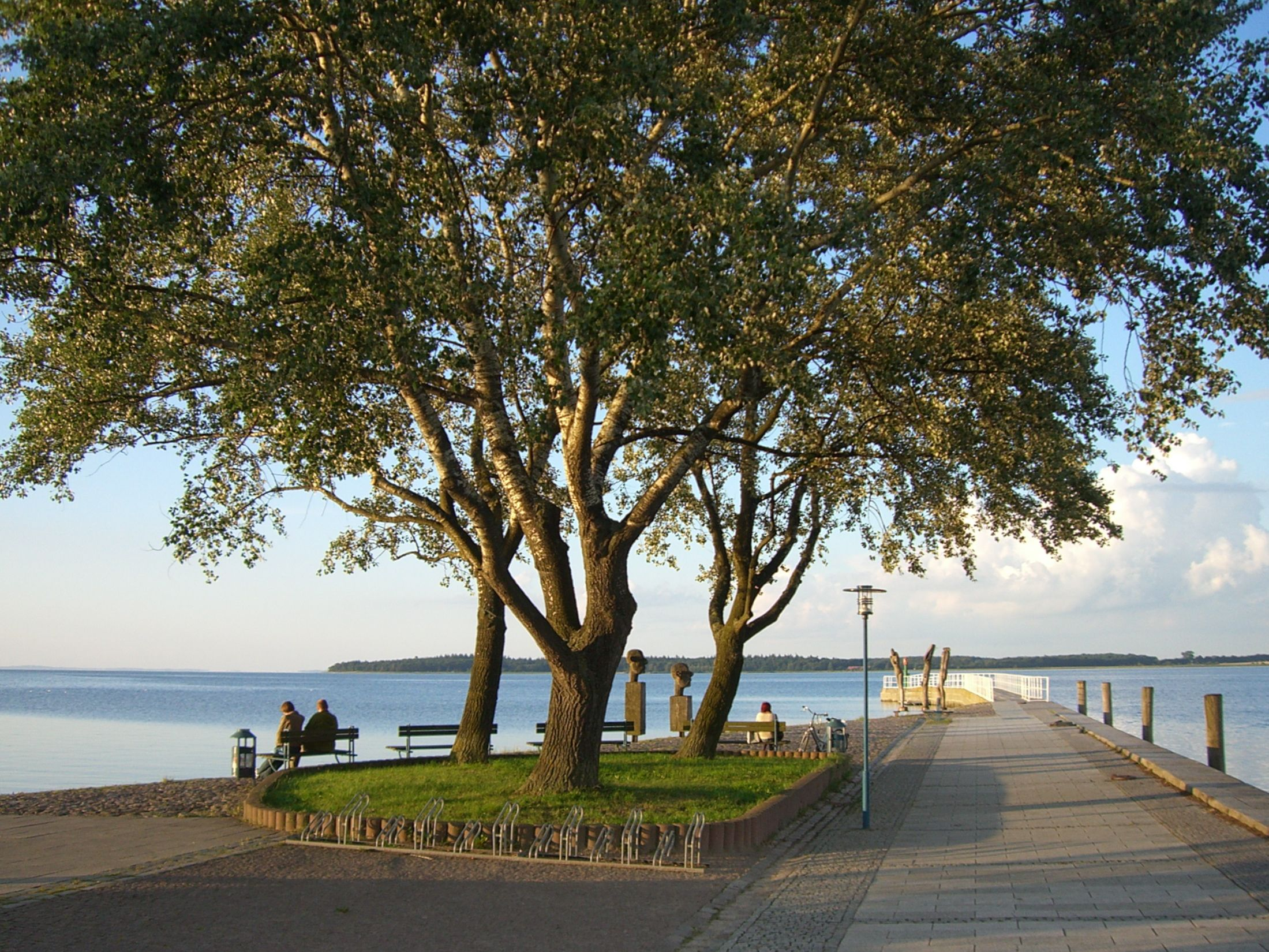 Wiecker Mole in Greifswald